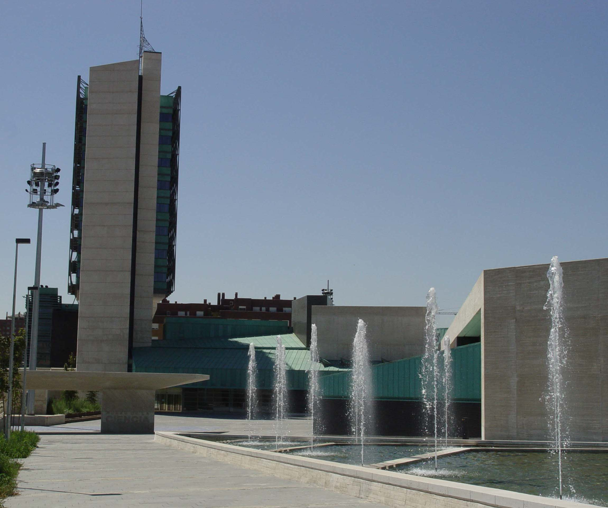 Vistas de la Plaza del Museo de la Ciencia de Valladolid